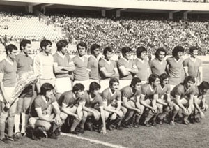 Pas Tehran F.C., Azadi Stadium